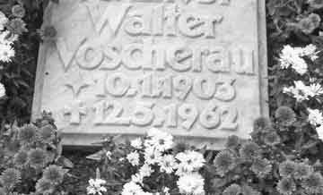 Grabstätte von Schauspieler Walter Scherau auf dem Friedhof Ohlsdorf.